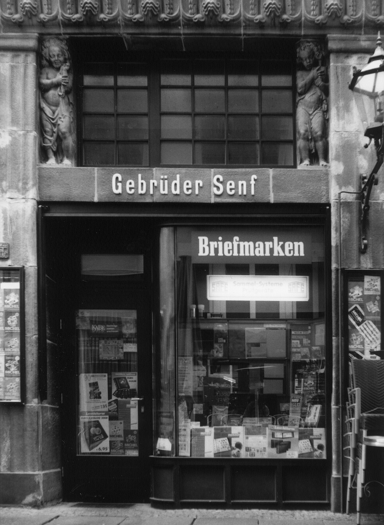 Briefmarkenhandel Gebrüder Senf, Barfußgäßchen 2, Leipzig. Das Geschäft wurde 2008 geschlossen.